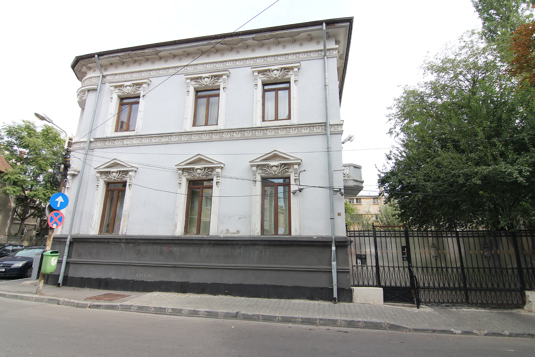 Casa Ionel Teodoreanu